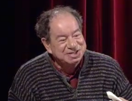 Alberto Pimenta, Câmara Clara, 2008